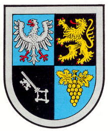 Blason de la Verbandsgemeinde Grünstadt-Land